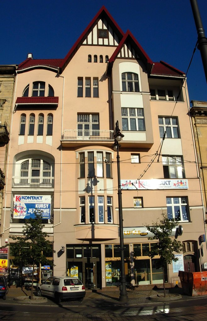 Kamienica ul. Gdańska 34 w Bydgoszczy